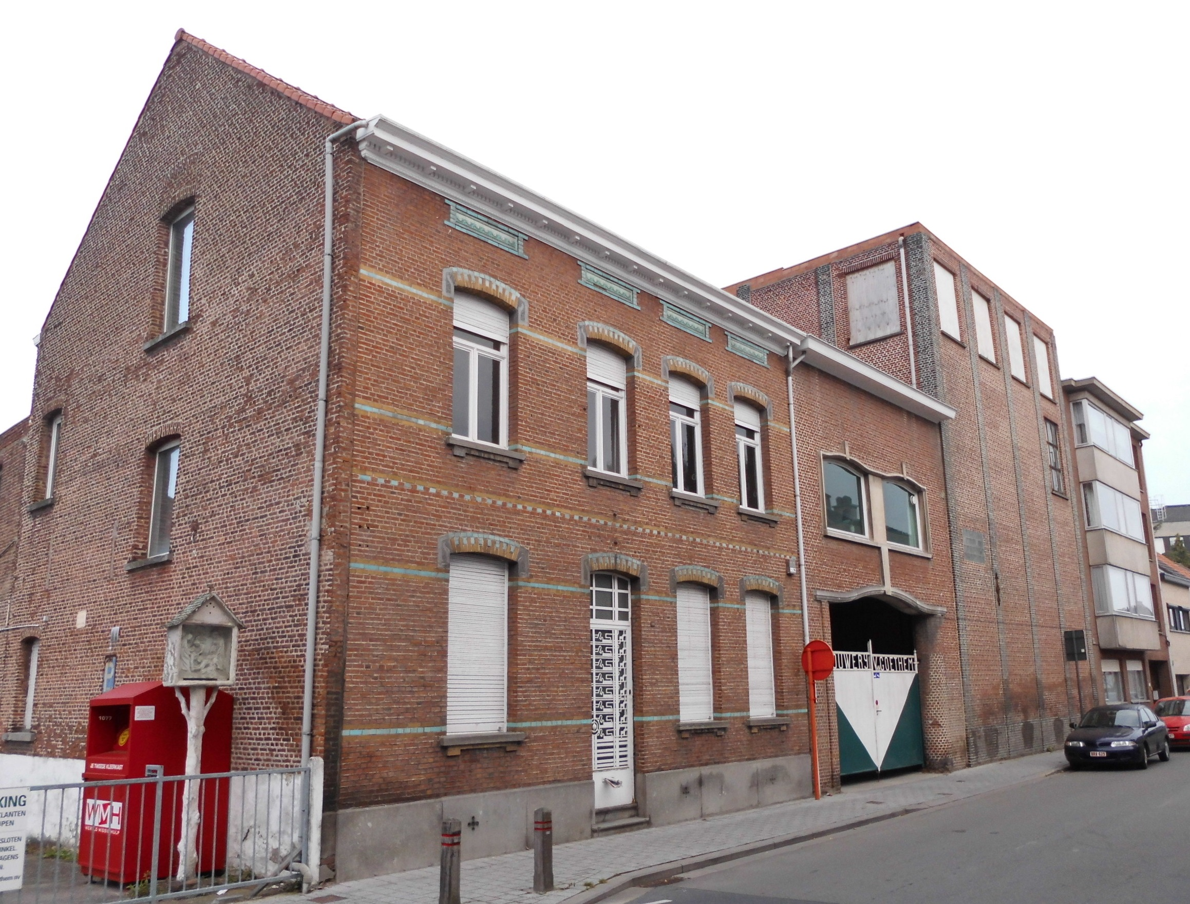 Brouwerij Van Goethem - Gelaagstraat - Steendorp - Temse - Oost-Vlaanderen - België